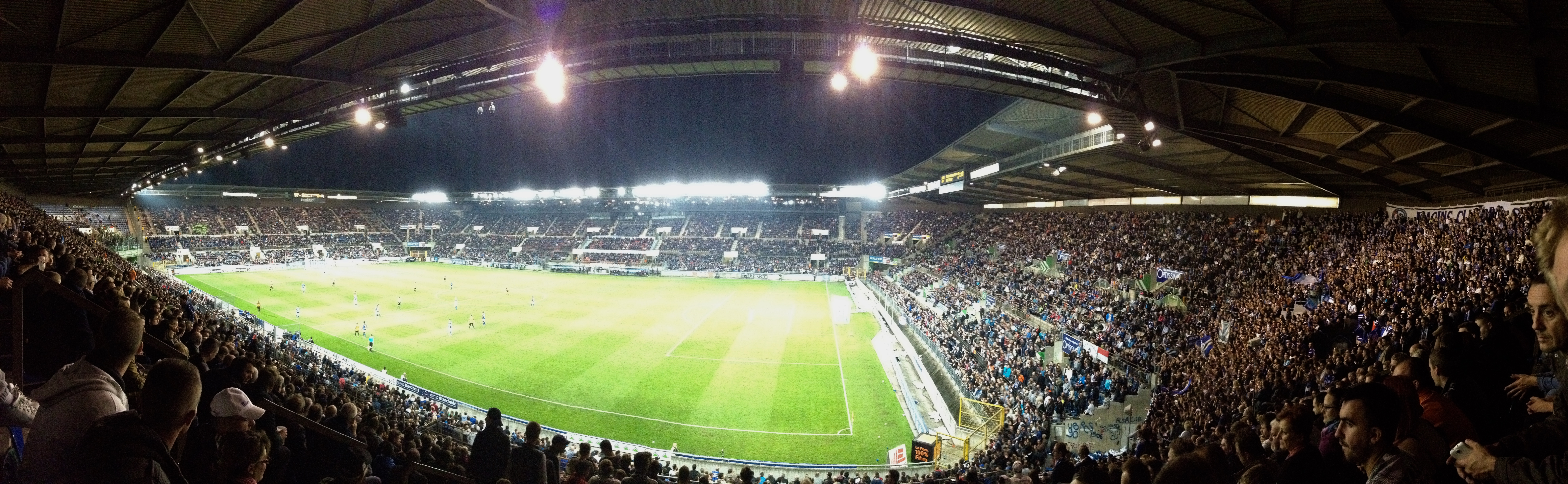 Panorama du Stade de la Meinau pour la rencontre opposant le racing club de strasbourg aux sports réunis de Colmar.